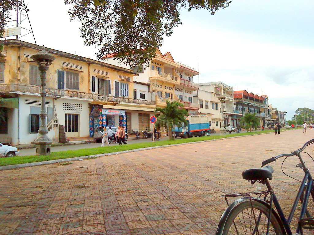 river side